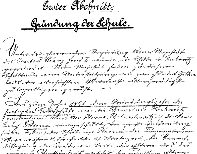 Informace o založení školy v Pustkovci.